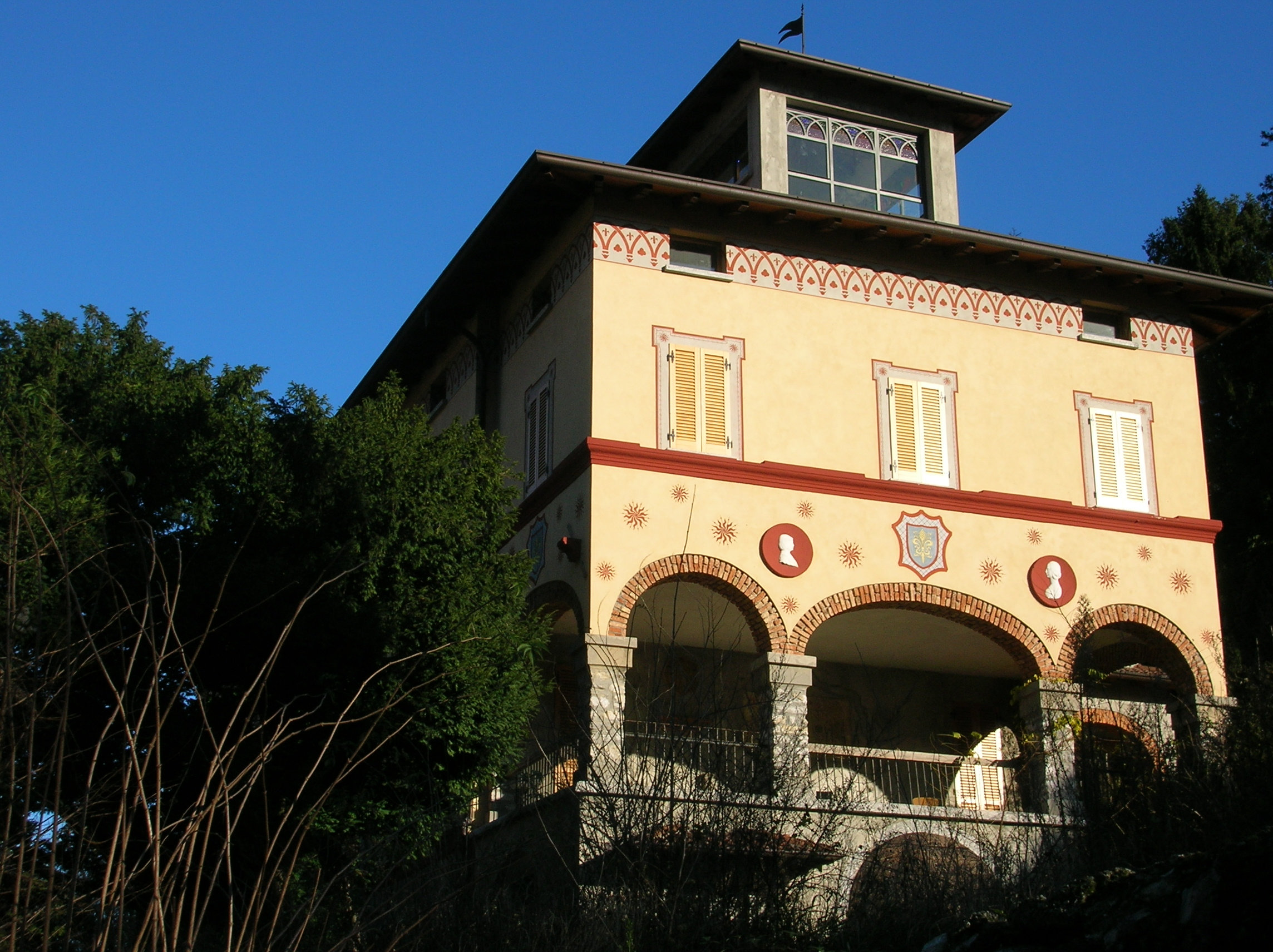 scorcio di villa Bertieri, ad Asso